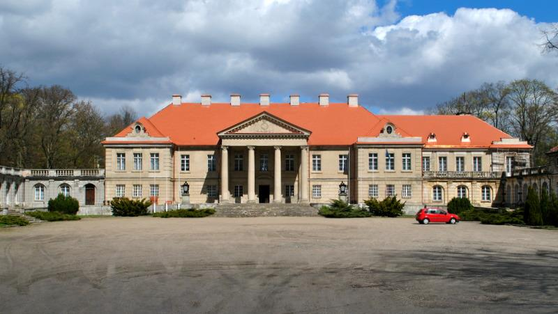 Czerniejewo - zespół pałacowy z XVIII-XX w.: Pałac Lipskich (zabytek nr 3/A)